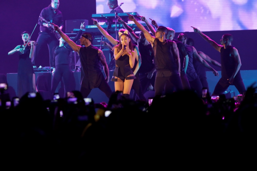 Imagen de la cantante Ariana Grande durante la gira The Honeymoon Tour en su paso por Jakarta (2015).